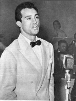 photo from Italian magazine Avanguardia, 1956.